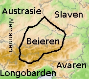 Globale kaart van de ligging van het hertogdom Beieren omstreeks 600